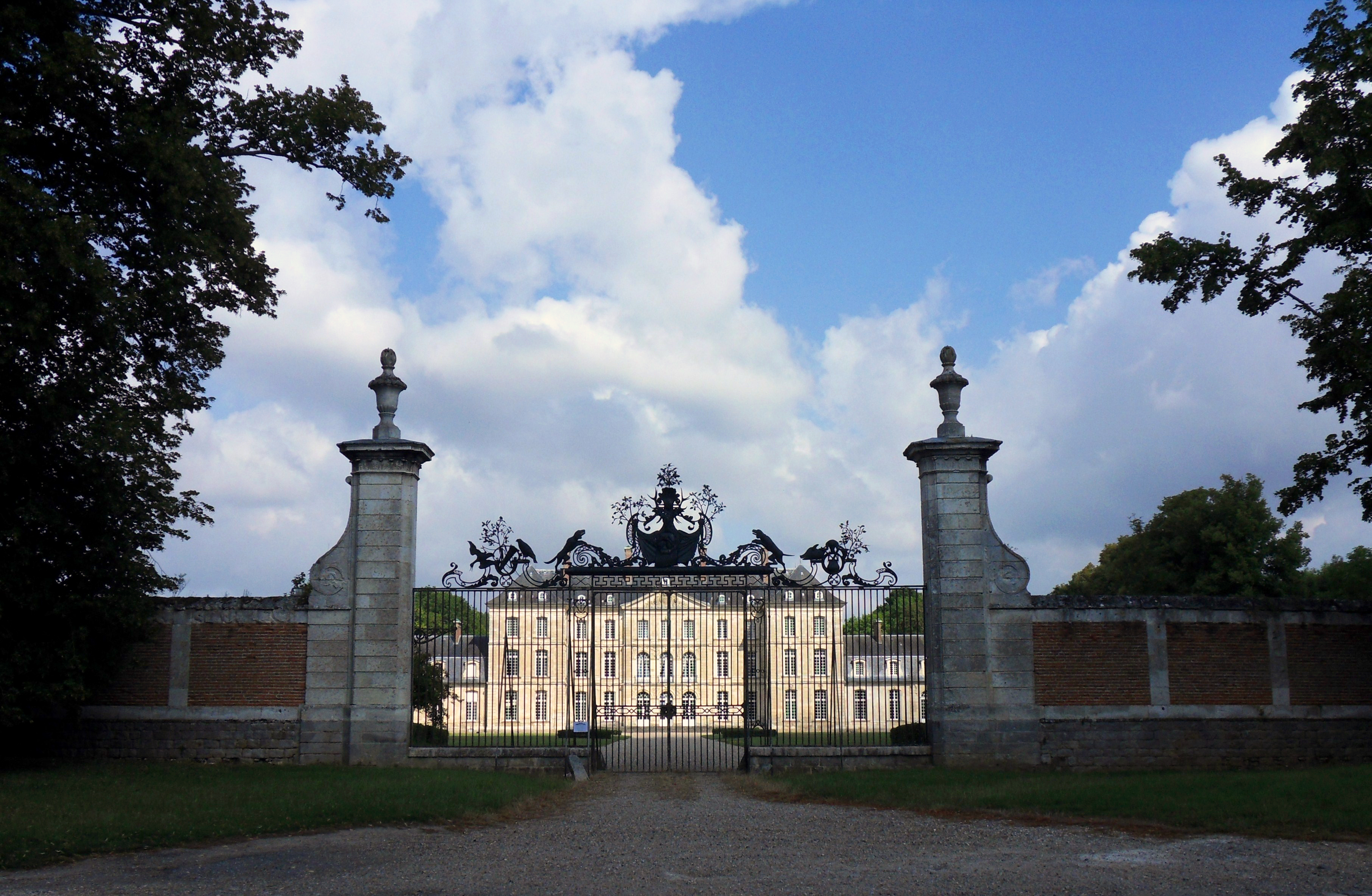 Bertangles (Somme, France). Le château et la grille d'honneur.